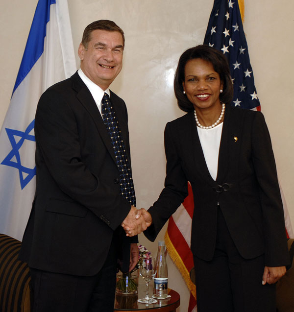 Haim Ramon and Condoleezza Rice.